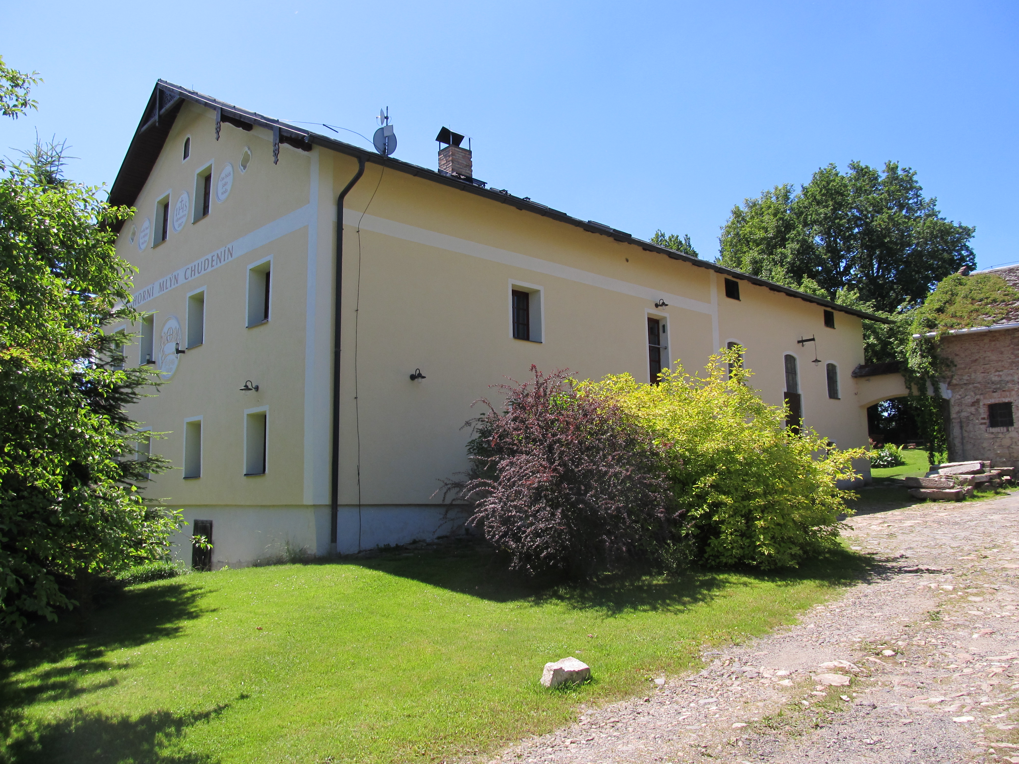 Chudenín - Horní mlýn